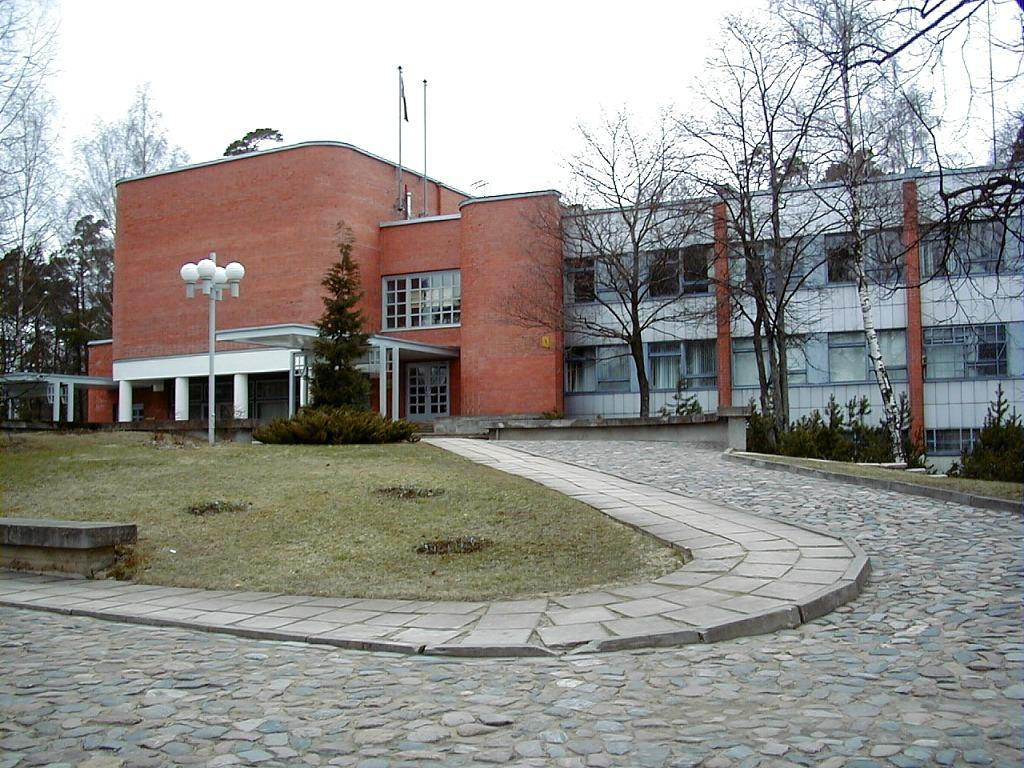 Saulkrastu pilsētas dome 2000-04-09